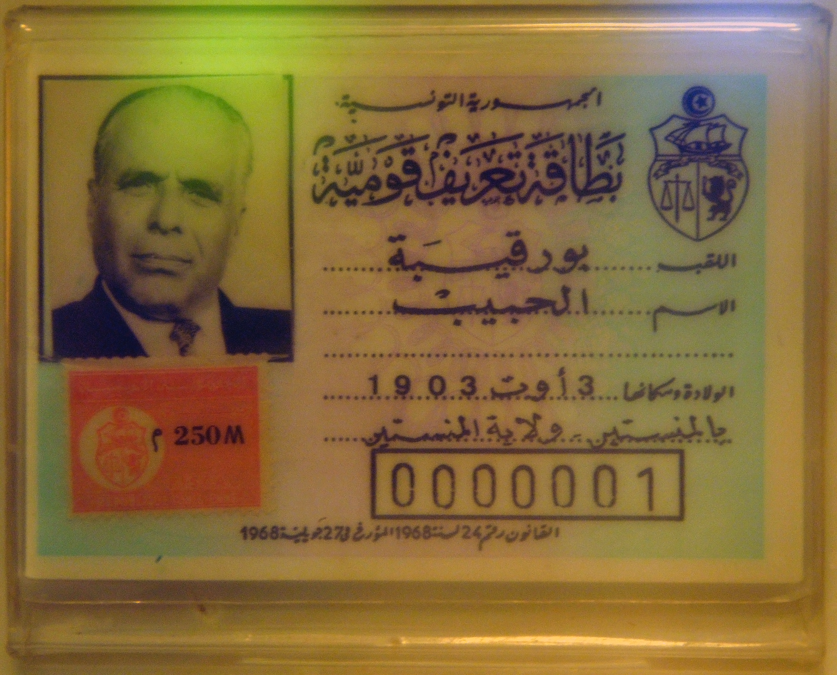 Carte identité de Habib Bourguiba dans le musée Bourguiba, Monastir